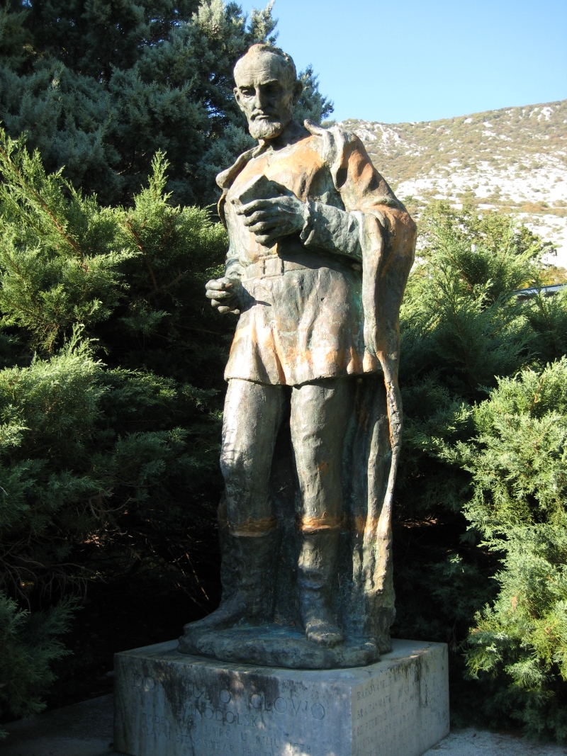 Juraj Julije Klovic, autor Zvonko Car, 1979., bronca 184 x 70 x 65 cm, Drivenik, Croatia